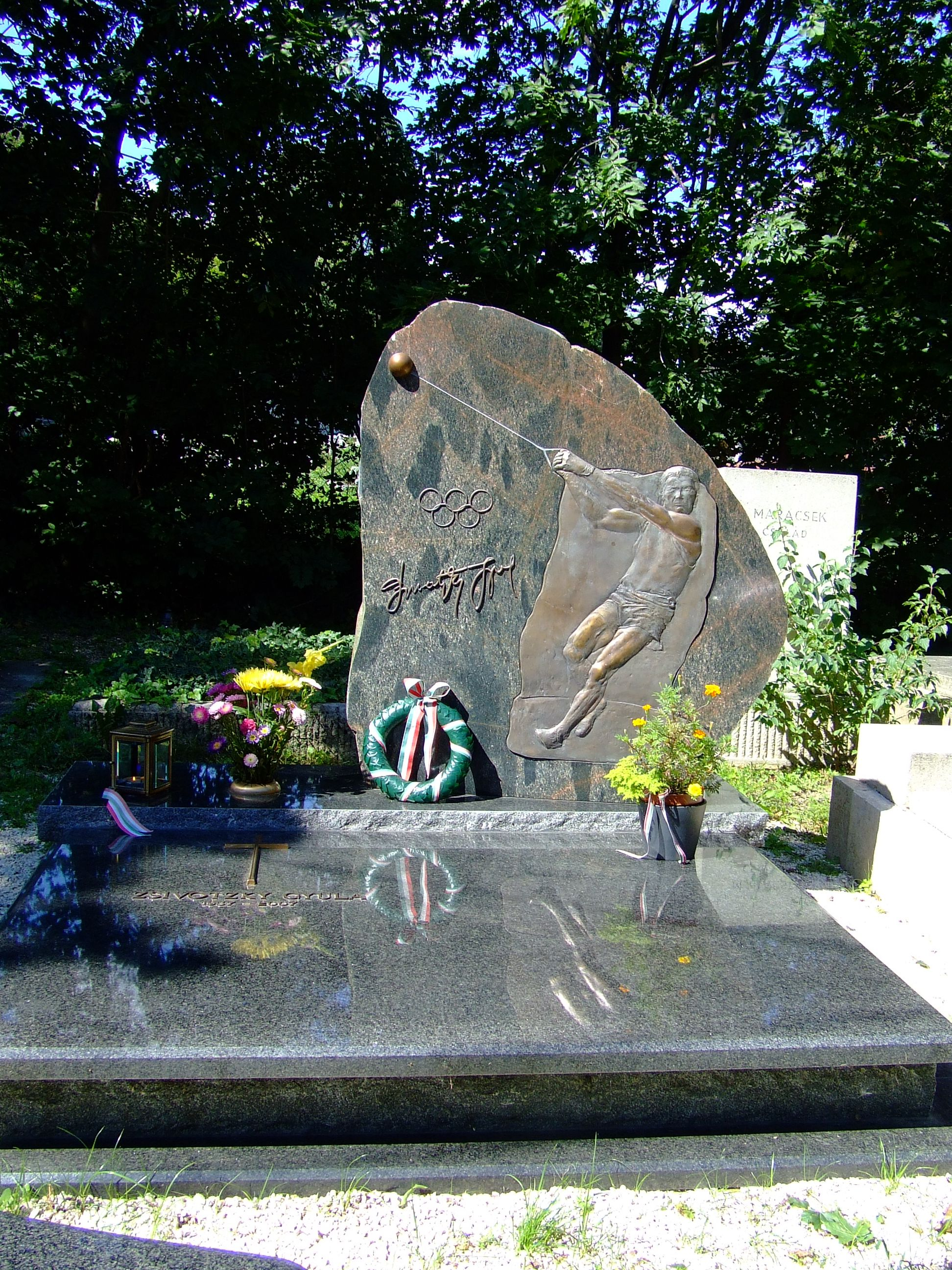 Zsivótzky Gyula (1937–2007) olimpiai bajnok kalapácsvető sírja az Óbudai temetőben